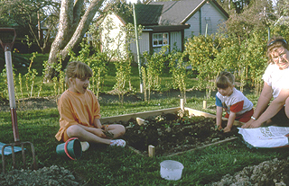 Work in allotment garden, Oslo.